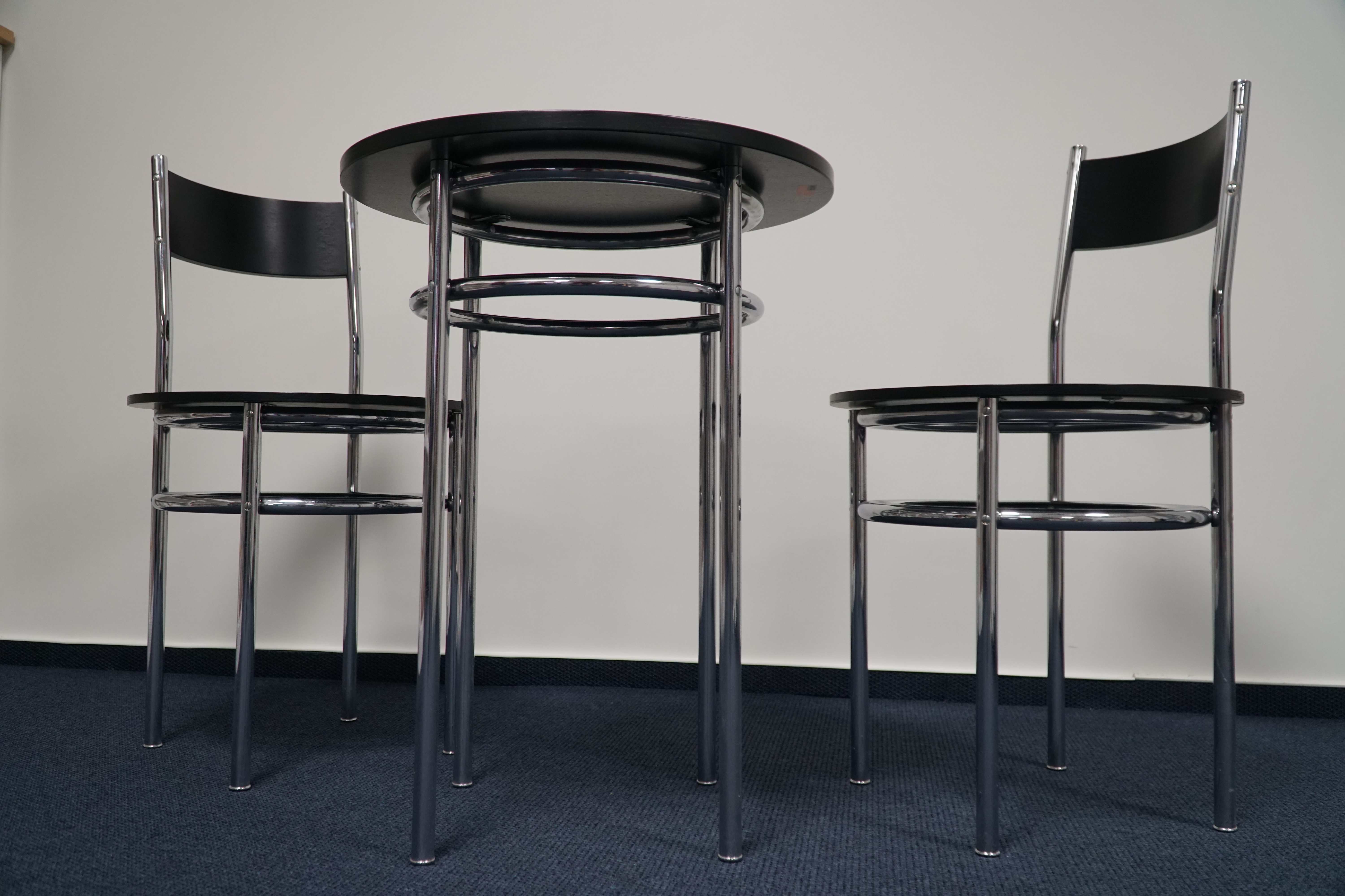 Foto: Wilfried Tschammer